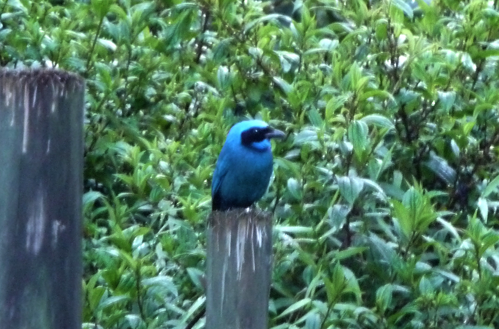 Turquoise Jay. Cyanolyca turcosa